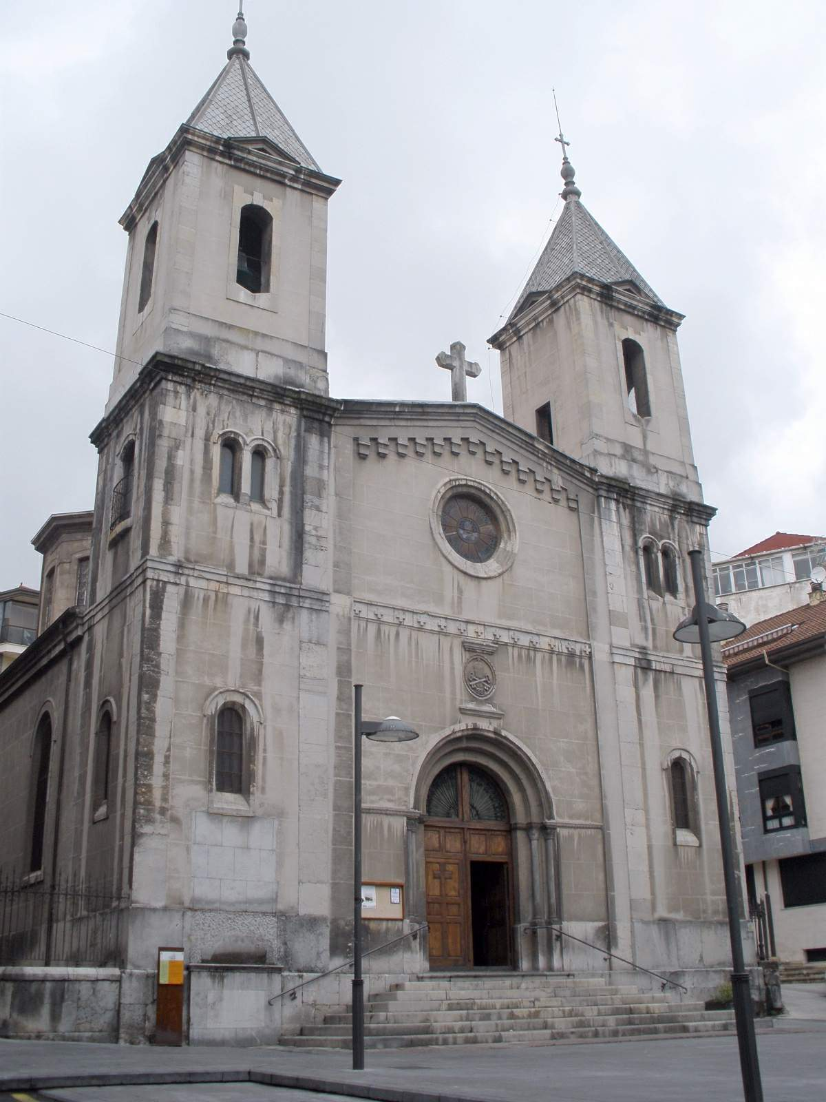 Iglesia de San Pedro (Grado, Asturias)